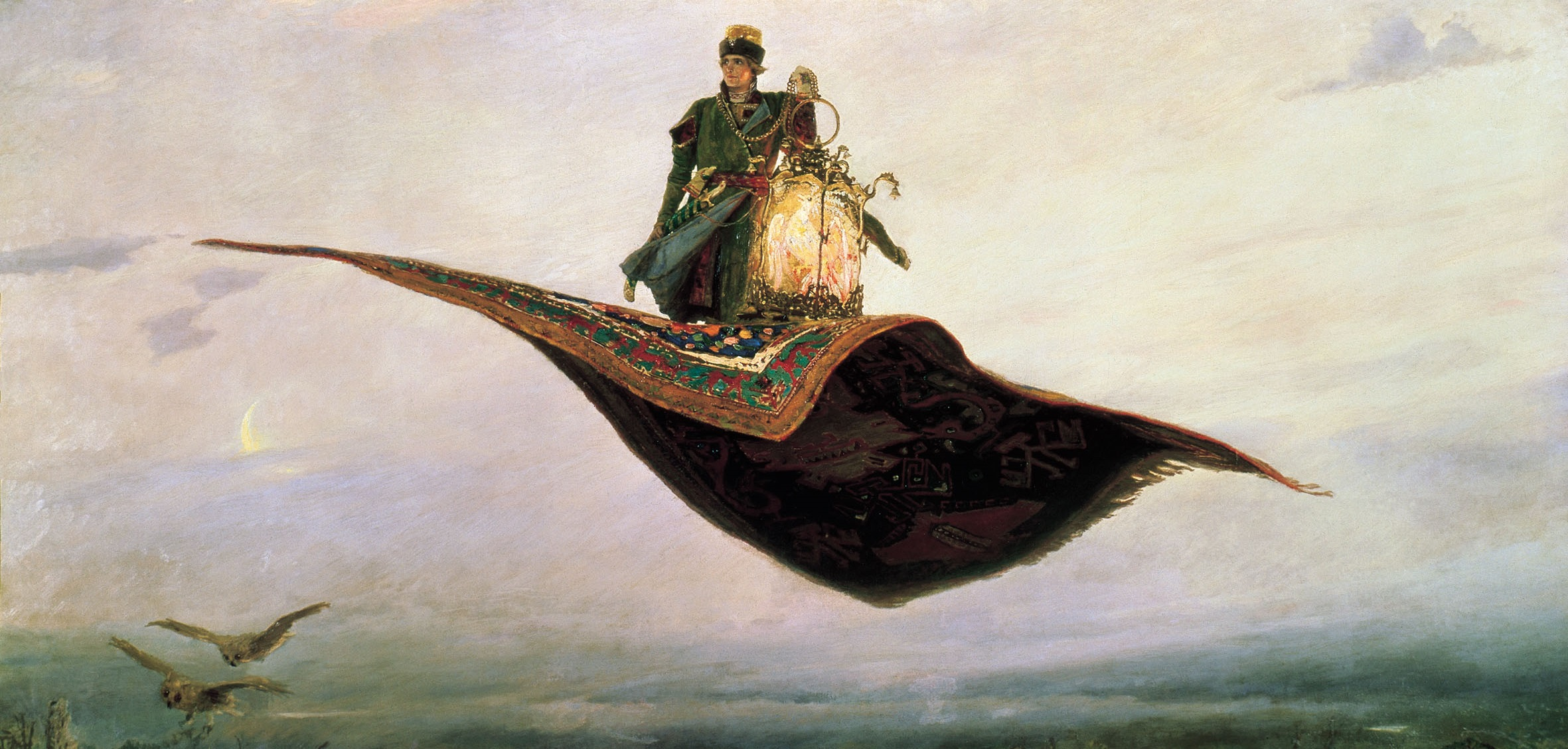 Den flyvende teppet» av russeren Viktor Vasnetsov. Maleri fra 1880